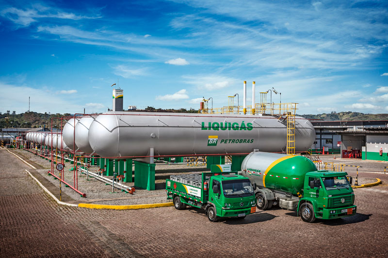 Centro Operativo Liquigás